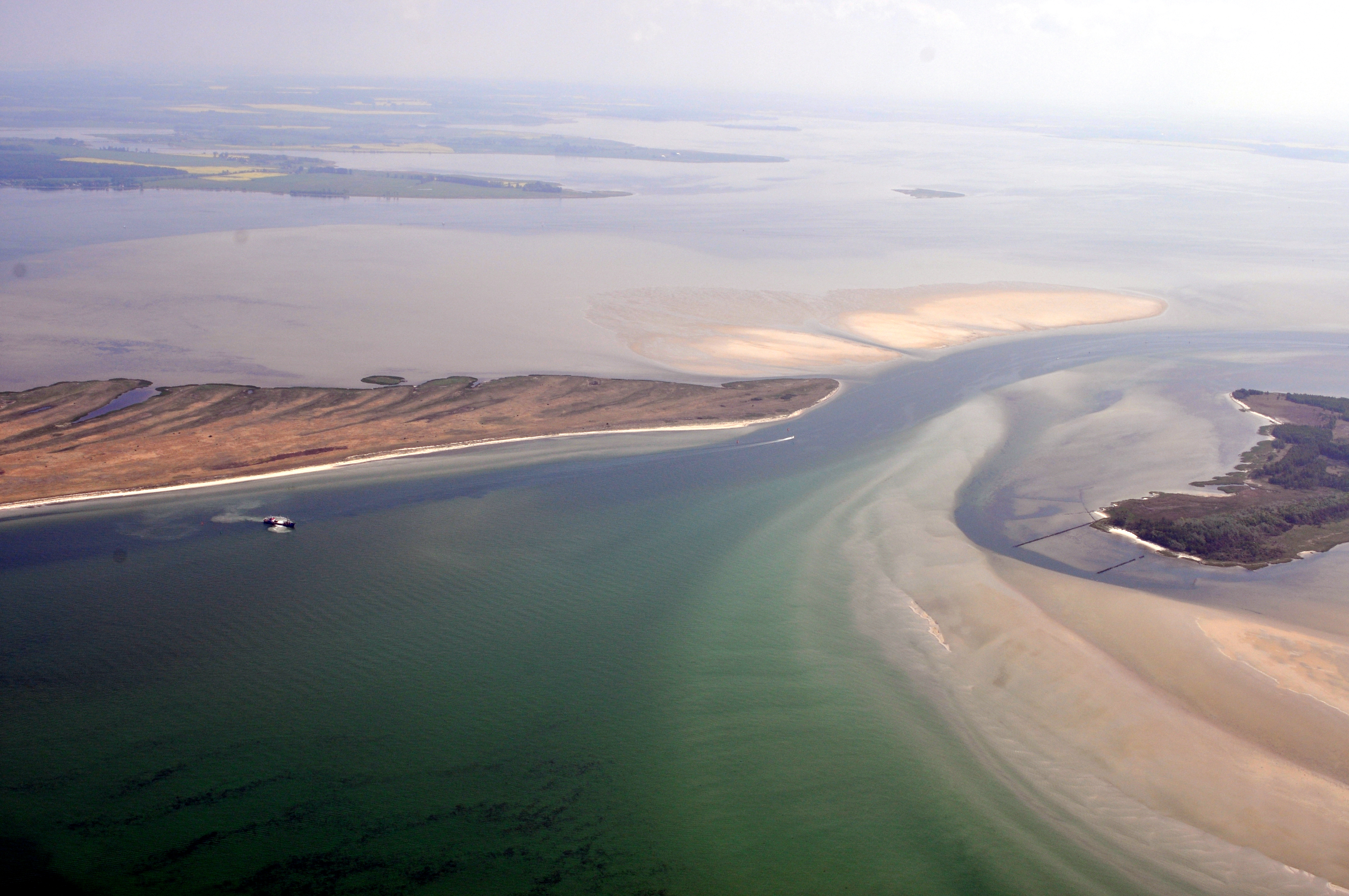 Die Bilder wurden von mir während eines einstündigen Rundflugs ab Flugplatz Güttin am 21. Mai 2011 aufgenommen. Die Bildbeschreibung steht im Dateinamen. Aufgenommen mit einer Nikon D5000 durch das Seitenfenster des Flugzeugs.